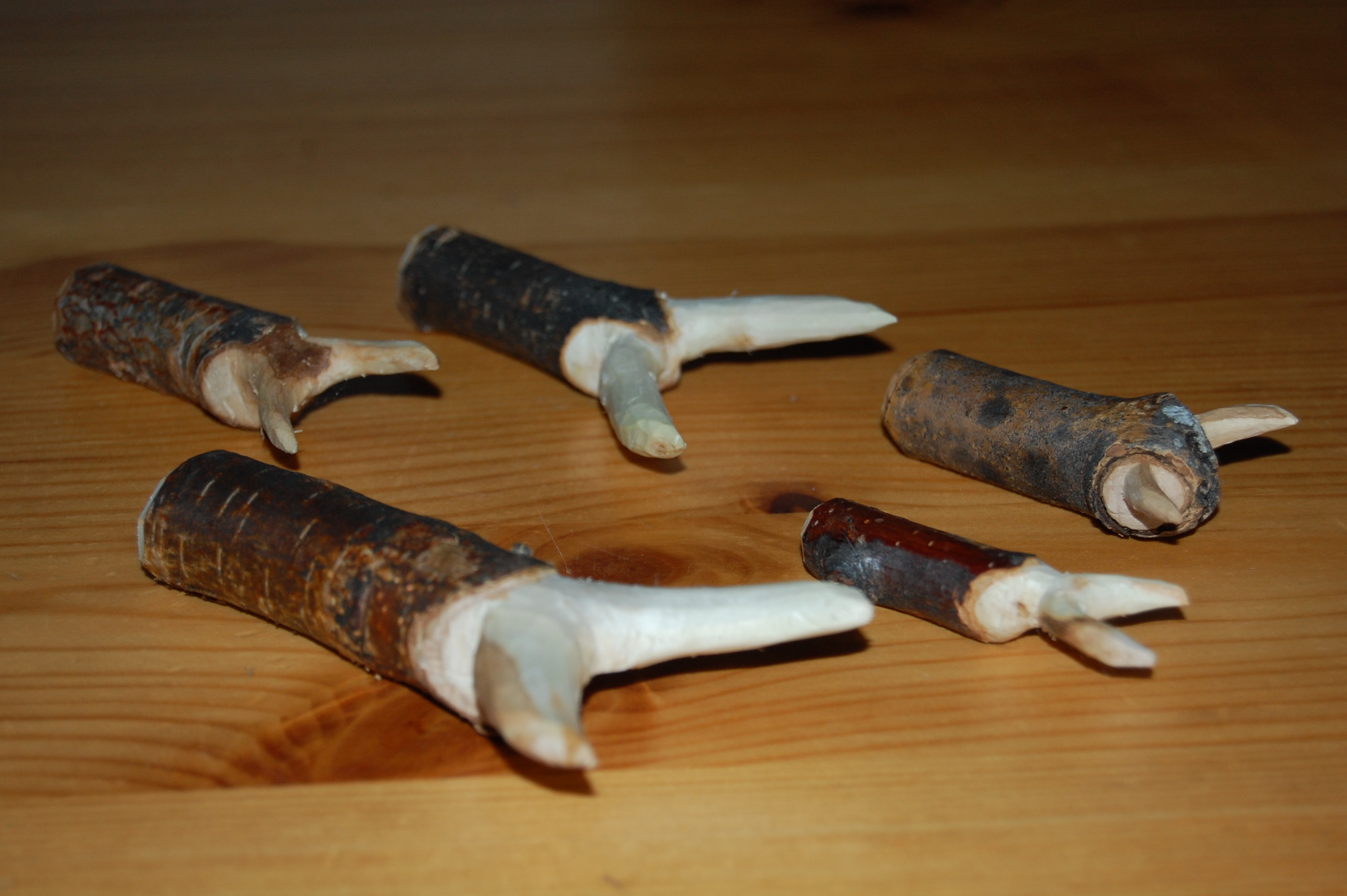 Cornaille - Jouet en bois figurant une vache